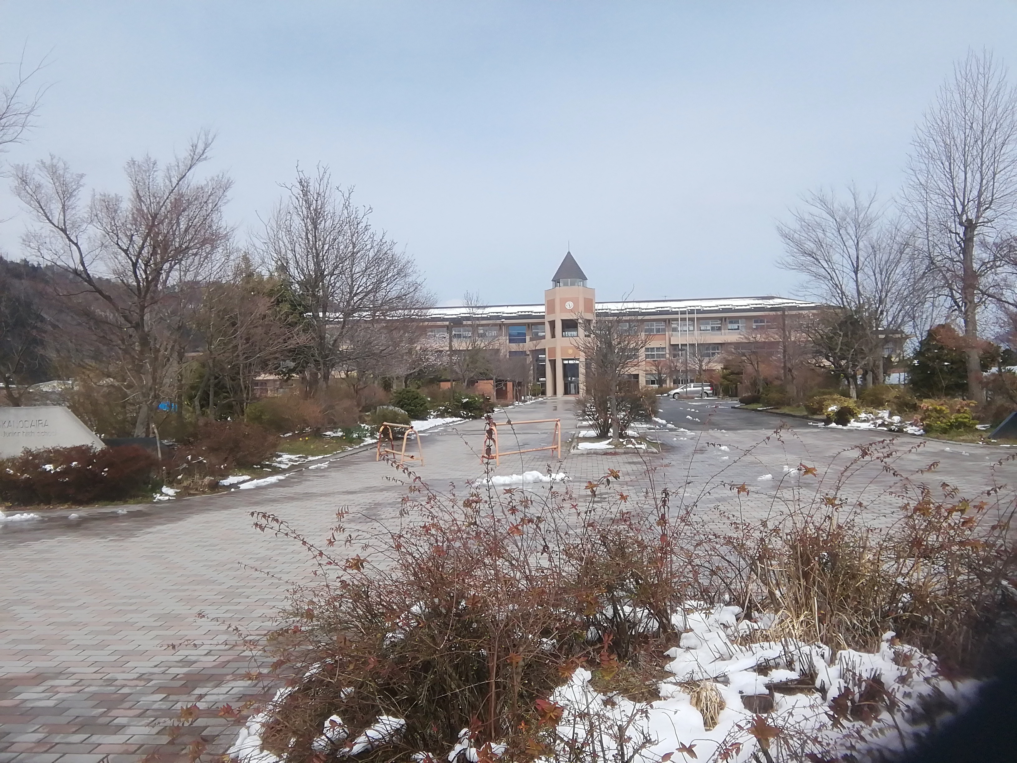 中野市立中野平中学校（2020-3-30）